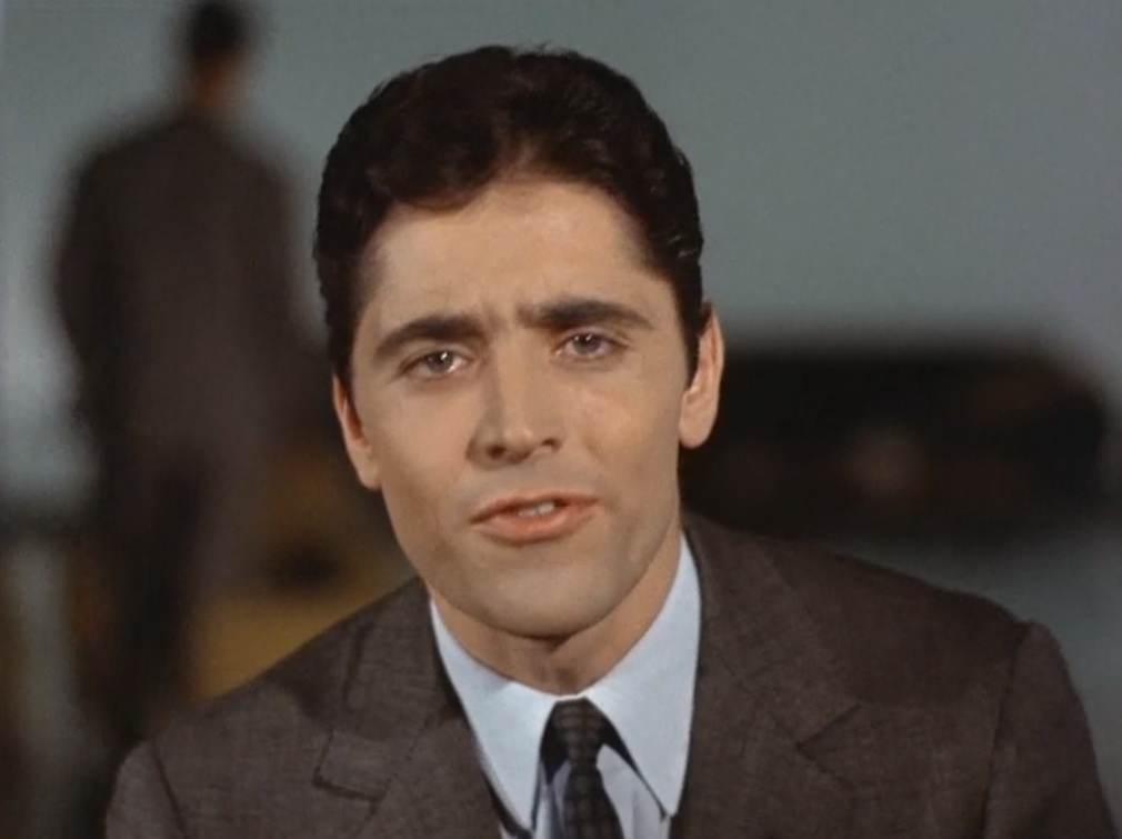 Screenshot dal film Viale della canzone (1965)